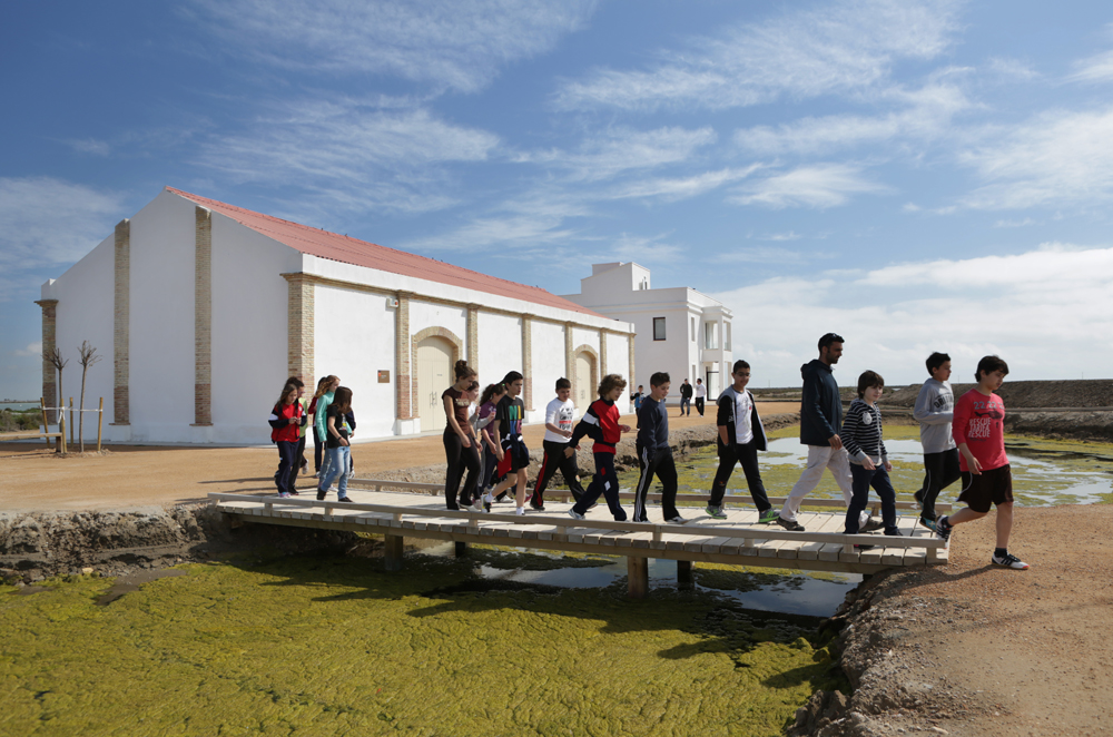 Equipament MónNatura Delta